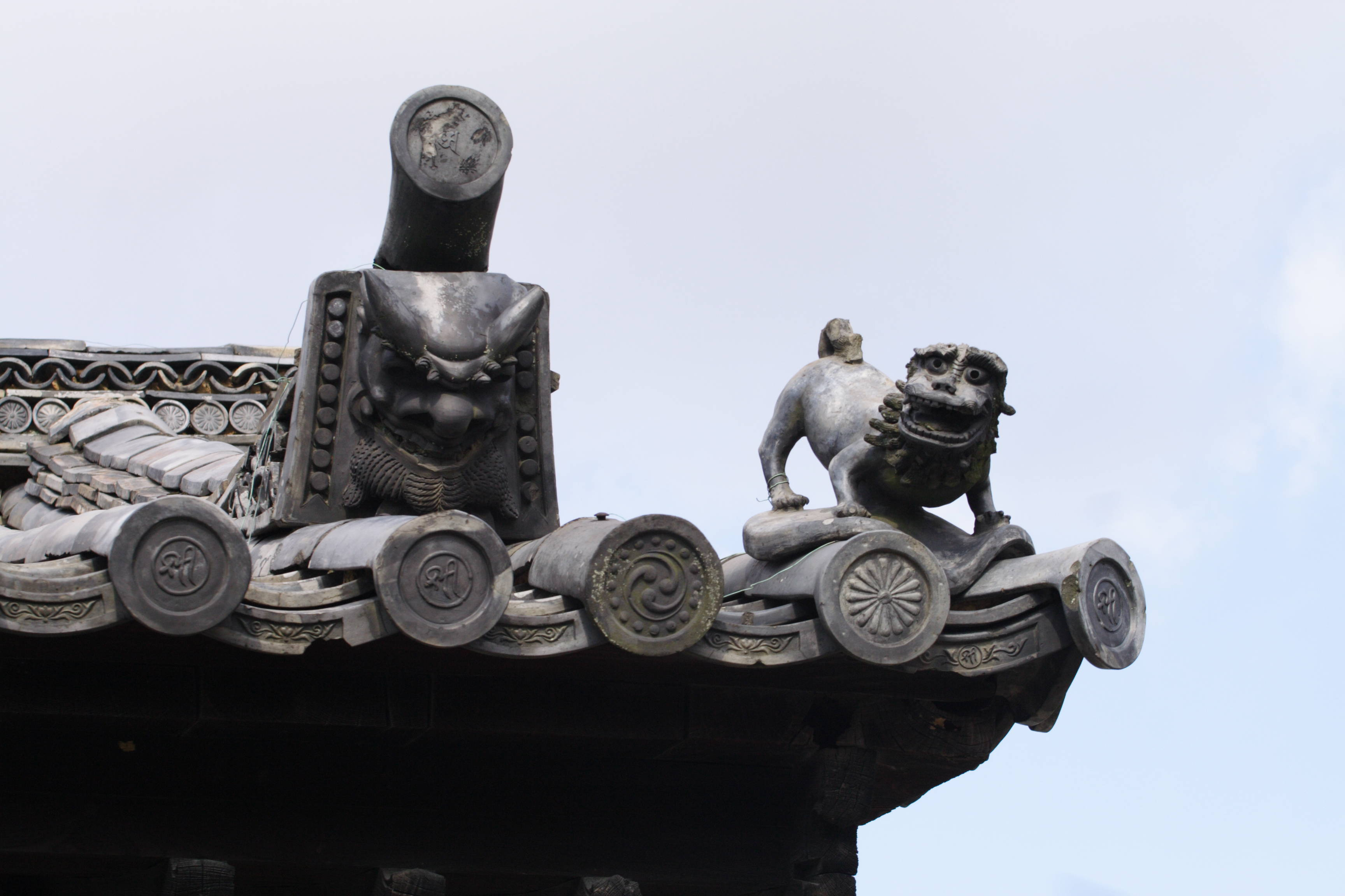 Onigawara of Kaidan-in in Todaiji/戒壇院の鬼瓦